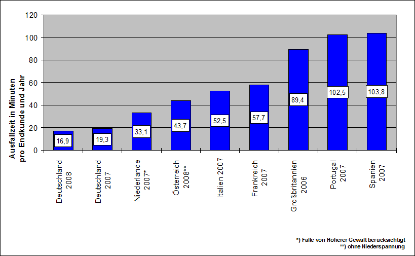 Ausfallzeiten verschiedener Stromnetze in Minuten pro Endkunde und Jahr